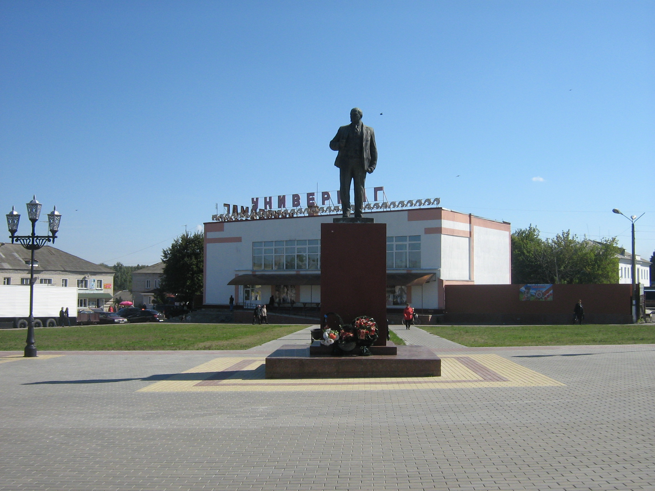 Памятник В.И. Ленину: Климово, Климовский район, Брянская область